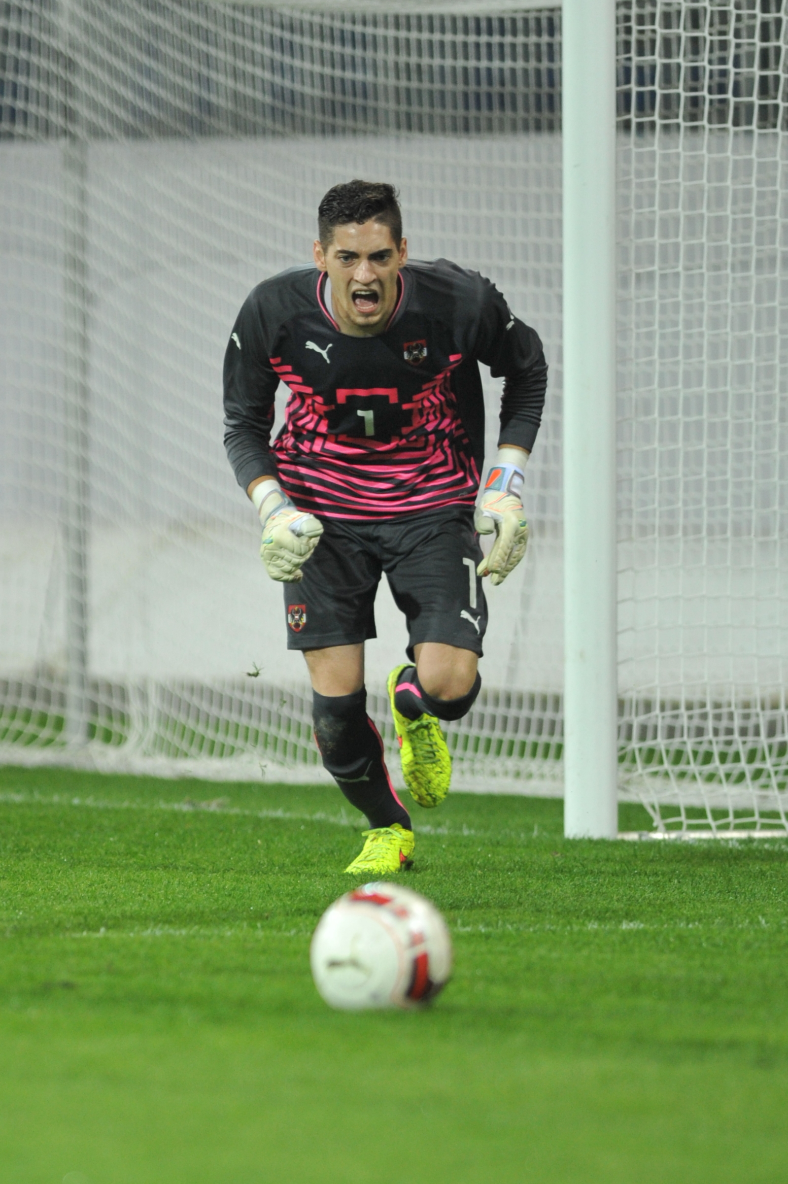 U21 EM Qualifikation Österreich gegen Bosnien und Herzegowina am 5. September 2014 in St. Pölten